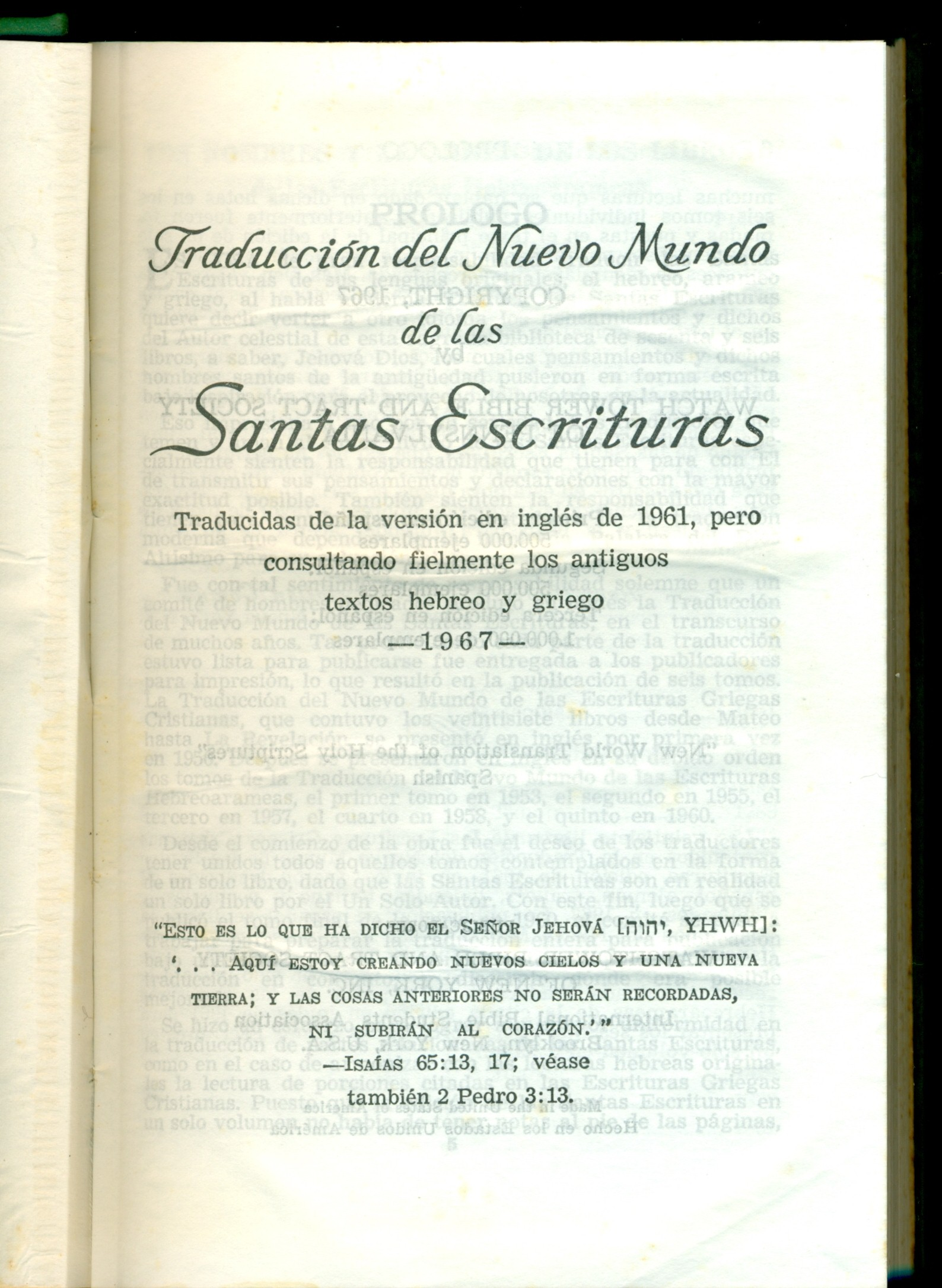 Portada de la Biblia TNM del año 1967 , basada en la versión de 1961